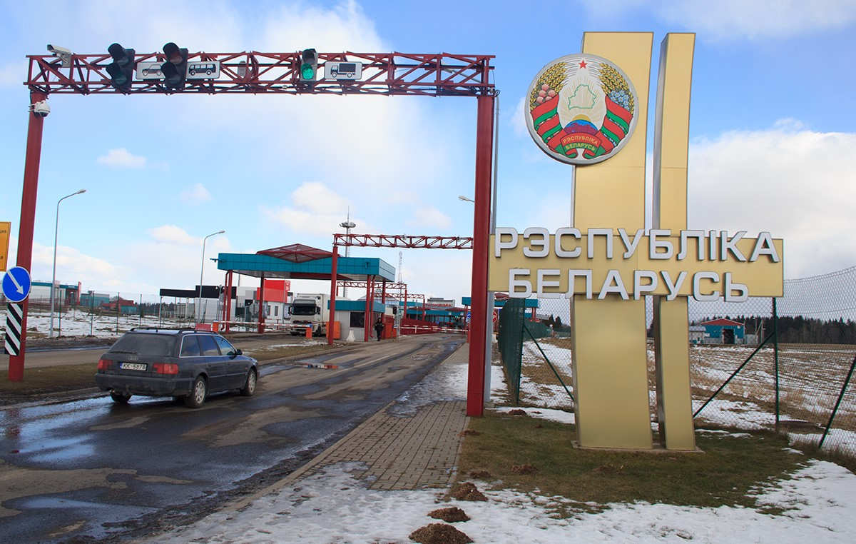 Пункт пропуску на мяжы з Латвіяй. З латвійскага боку яму адпавядае пункт пропуску «Патарніекі» Краслаўскага края. З'яўляецца адным з двух аўтамабільных пунктаў пропуску на мяжы Беларусі з Латвіяй і мае міжнародны стат